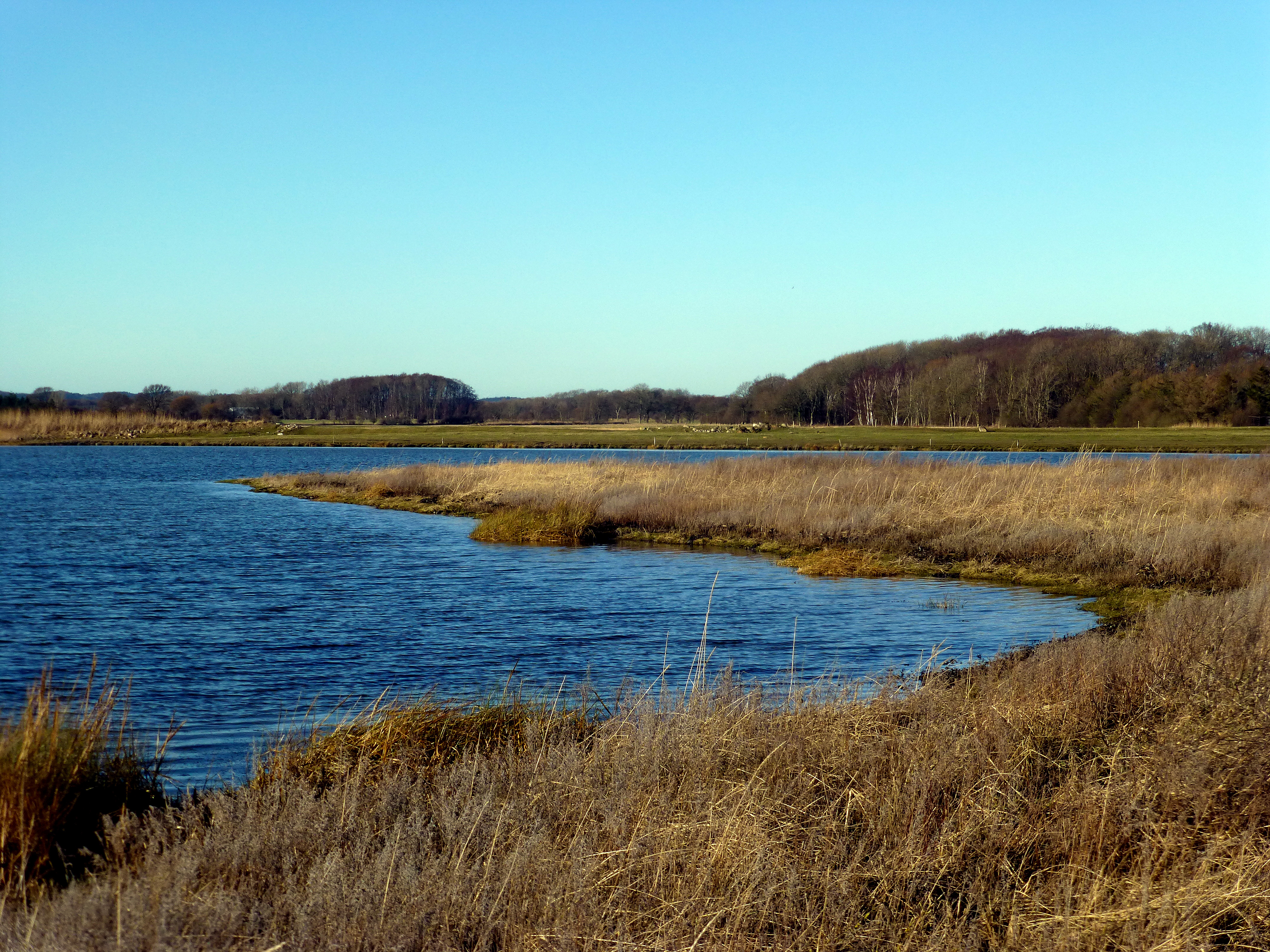 Udsigt mod sydøst